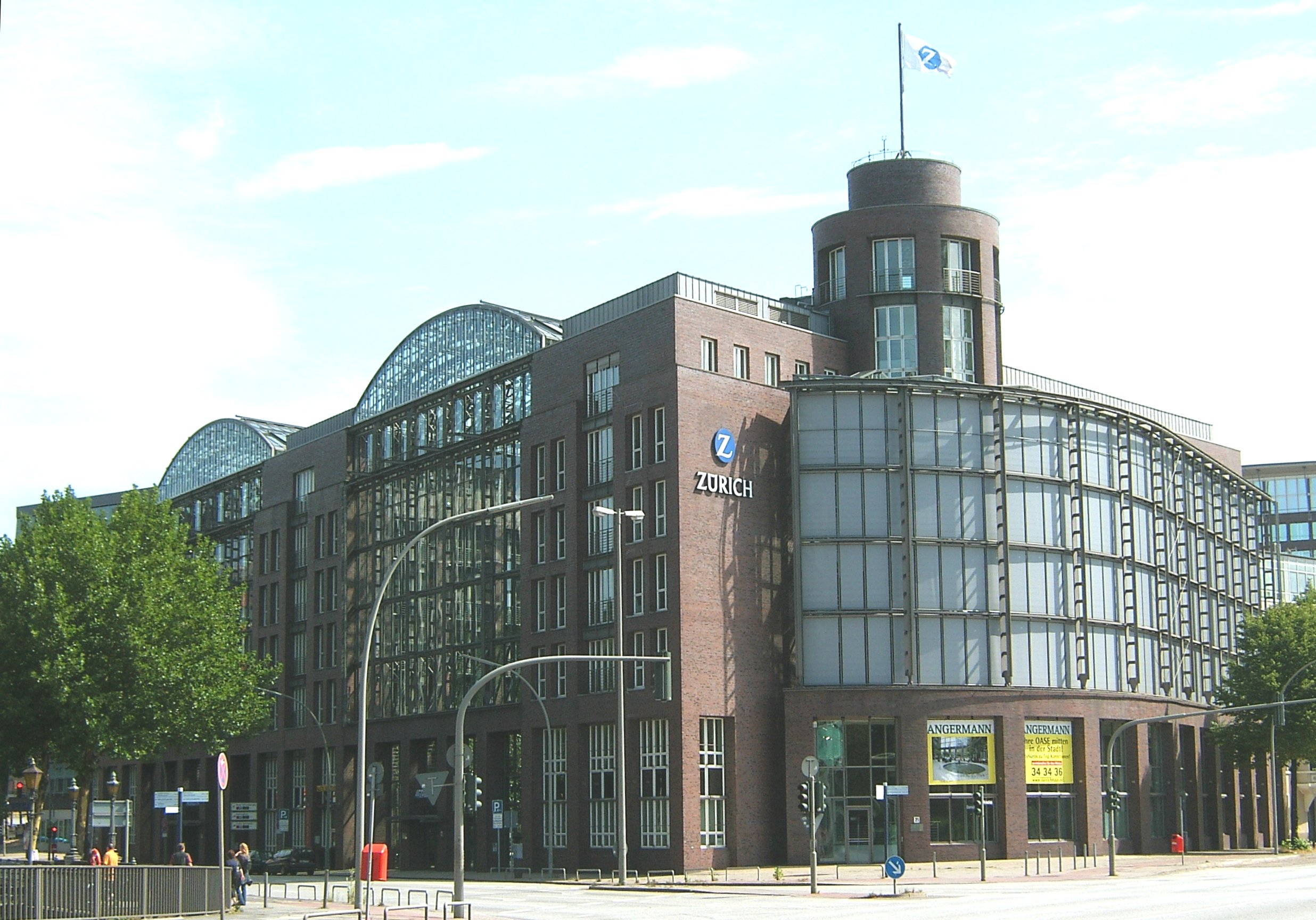 Das Zürichhaus an der Ecke Domstraße / Willy-Brandt-Straße in Hamburg-Altstadt